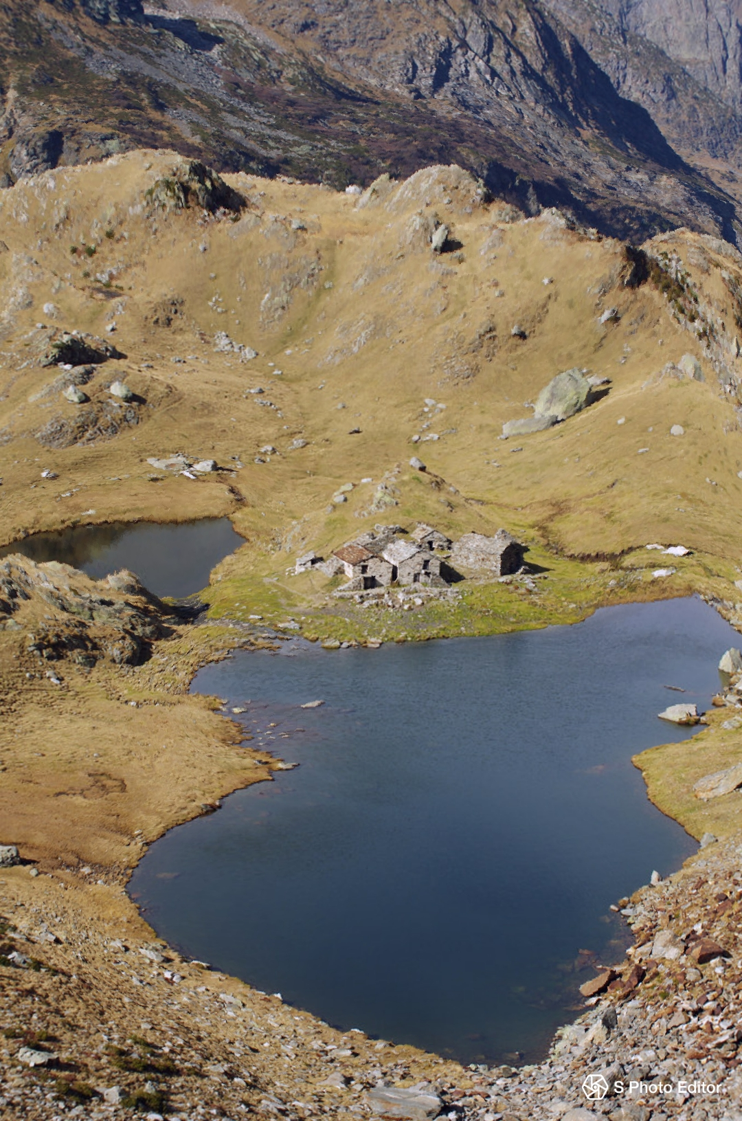 Alpeggio con due laghetti a 2000 metri